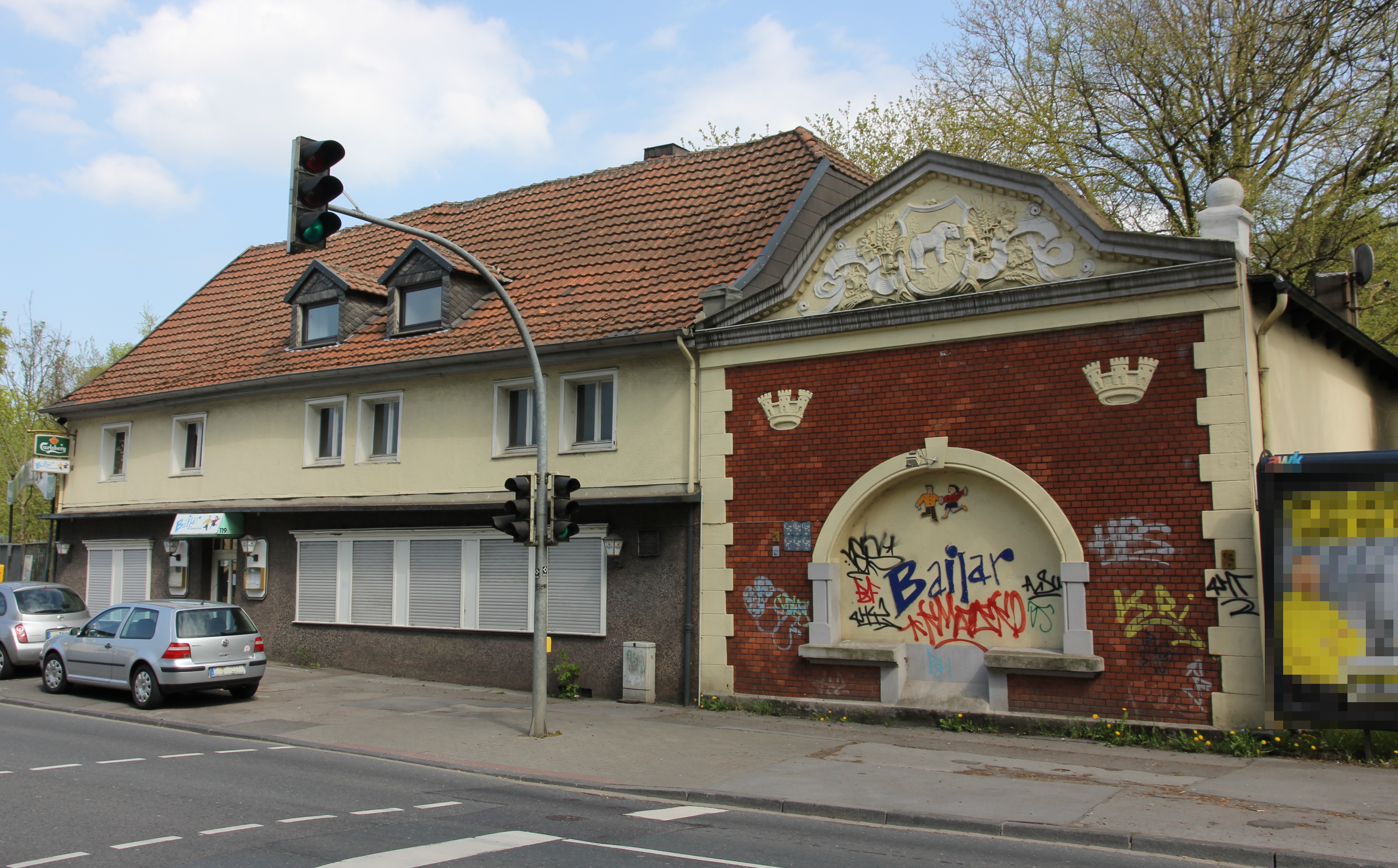 Gebäude der ehemaligen Quellen-Brauerei in Dortmund-Schüren